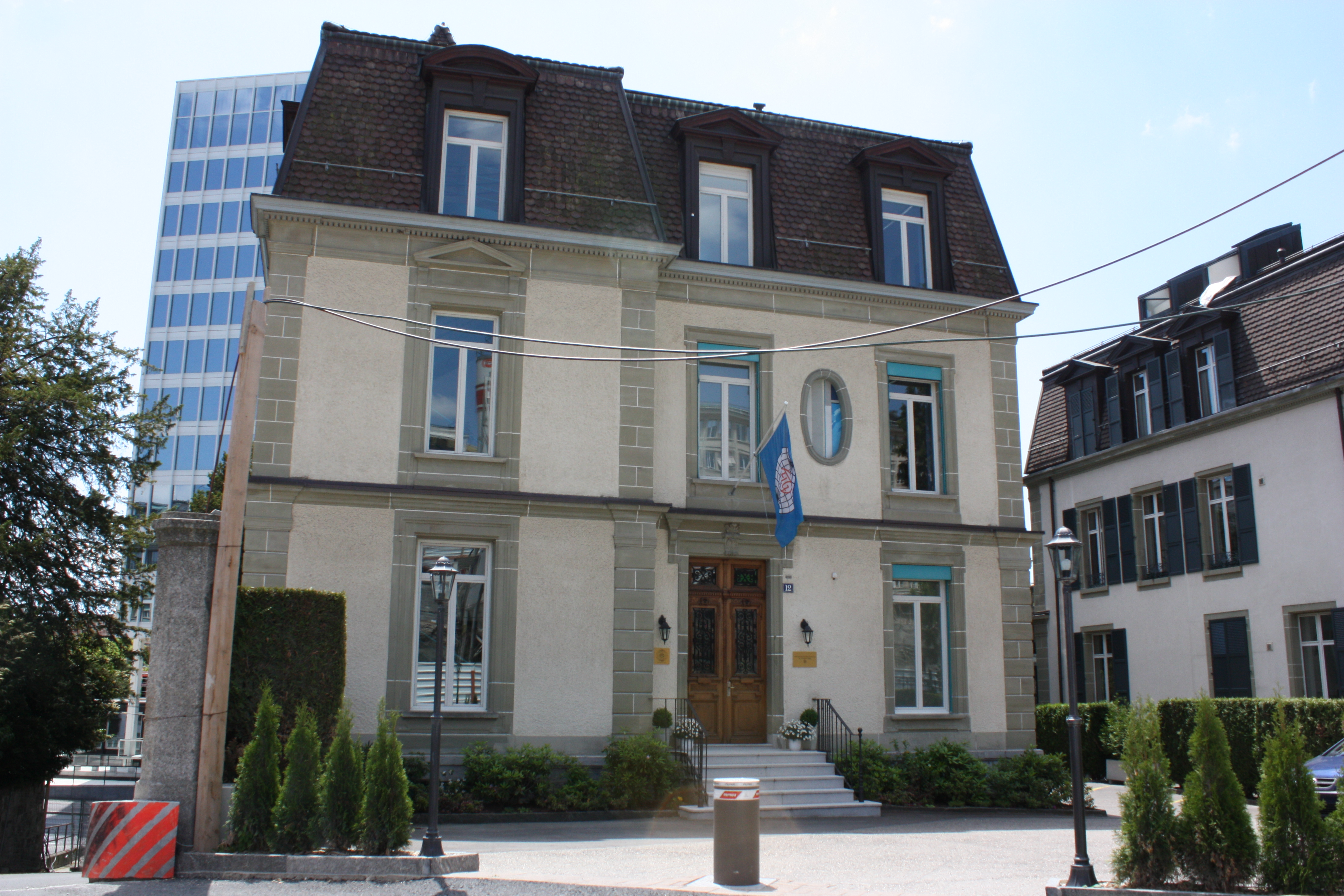 Siège de la Fédération Internationale de Gymnastique à Lausanne